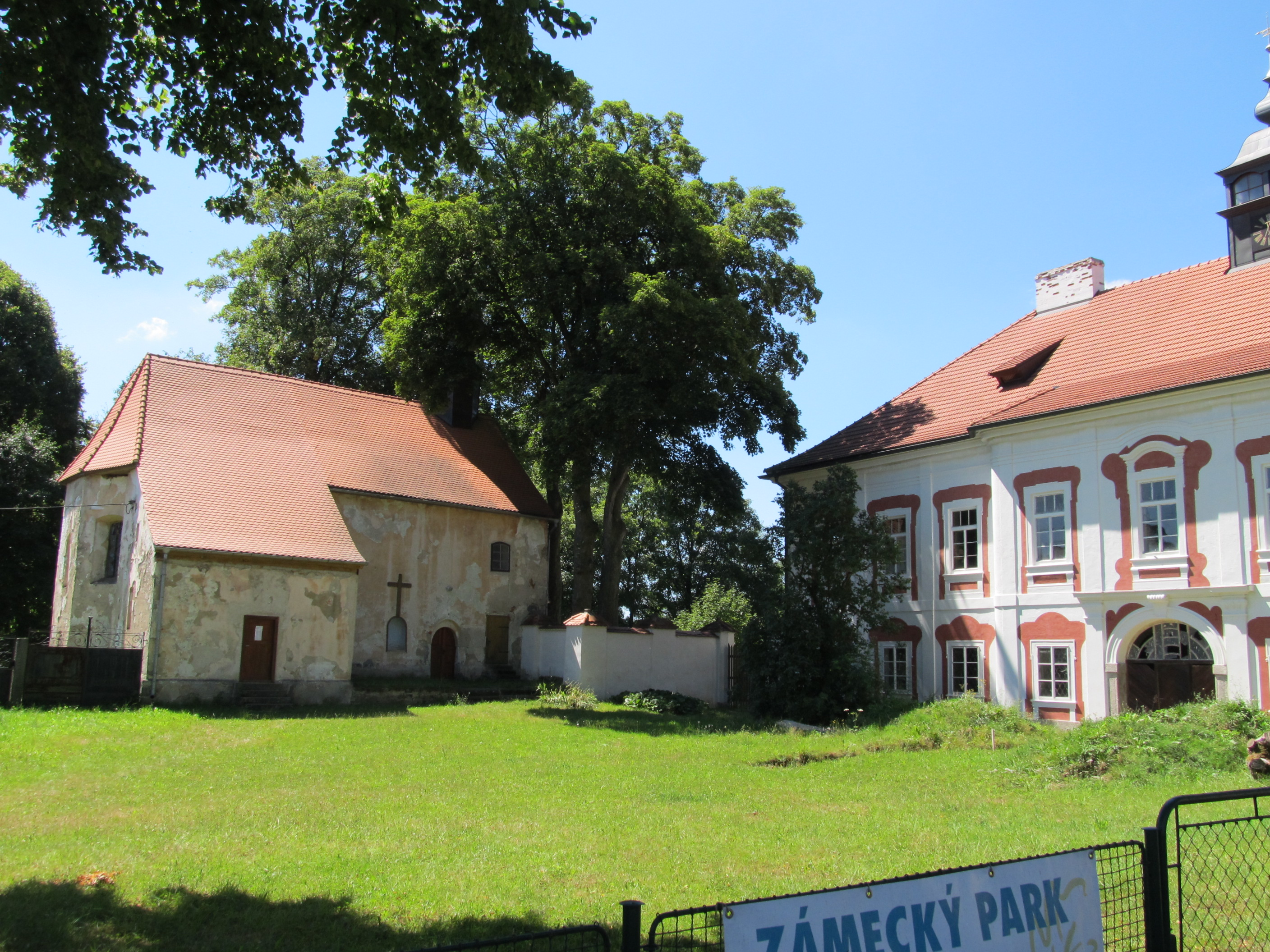 Mlázovy - kostel sv. Jana Křtitele a zámek